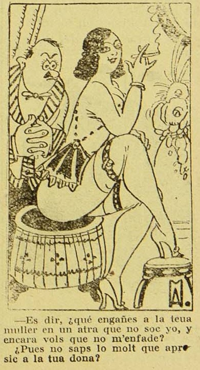 Vinyeta de Modest Méndez Álvarez publicada a "La Chala", editorial Carceller.